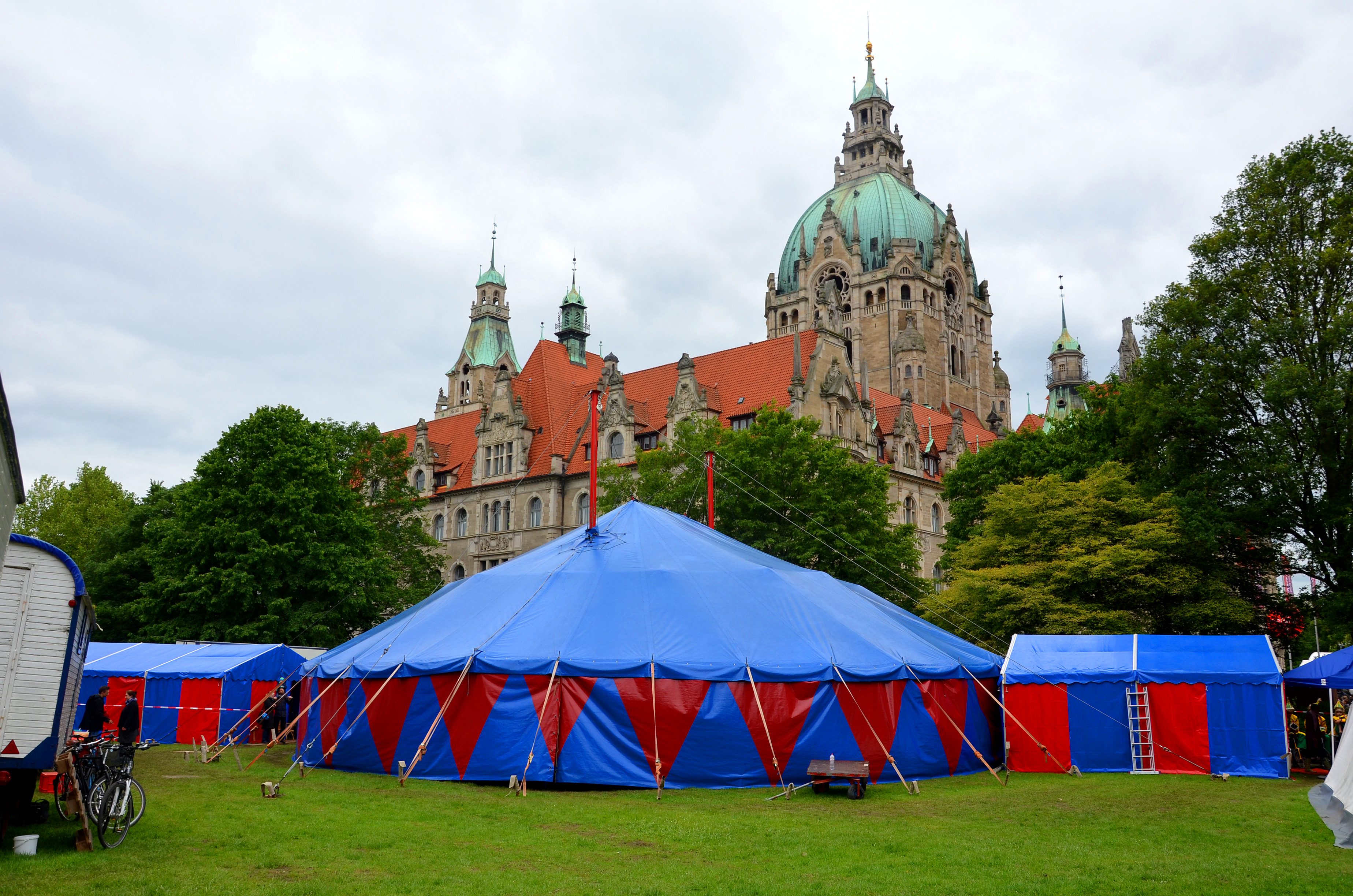 Zelte und Wagen vom Kinderzirkus Giovanni, hier am Vatertag beziehungsweise an Christi Himmelfahrt im Maschpark vor dem Neuen Rathaus in Hannover während der Jubiläumstour 2014 anlässlich der Feier zur Gründung im Jahr 1984 ...